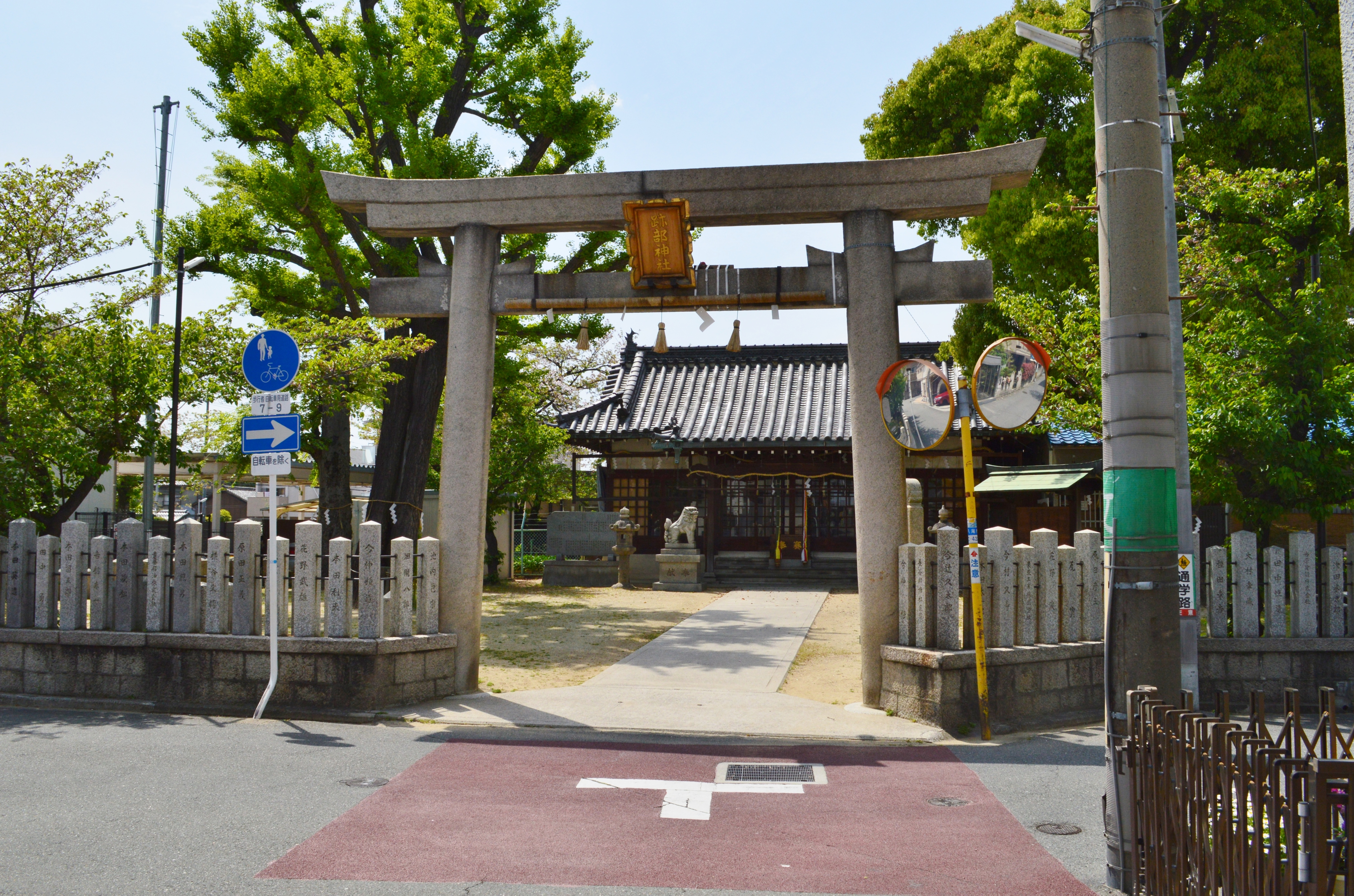 跡部神社 鳥居